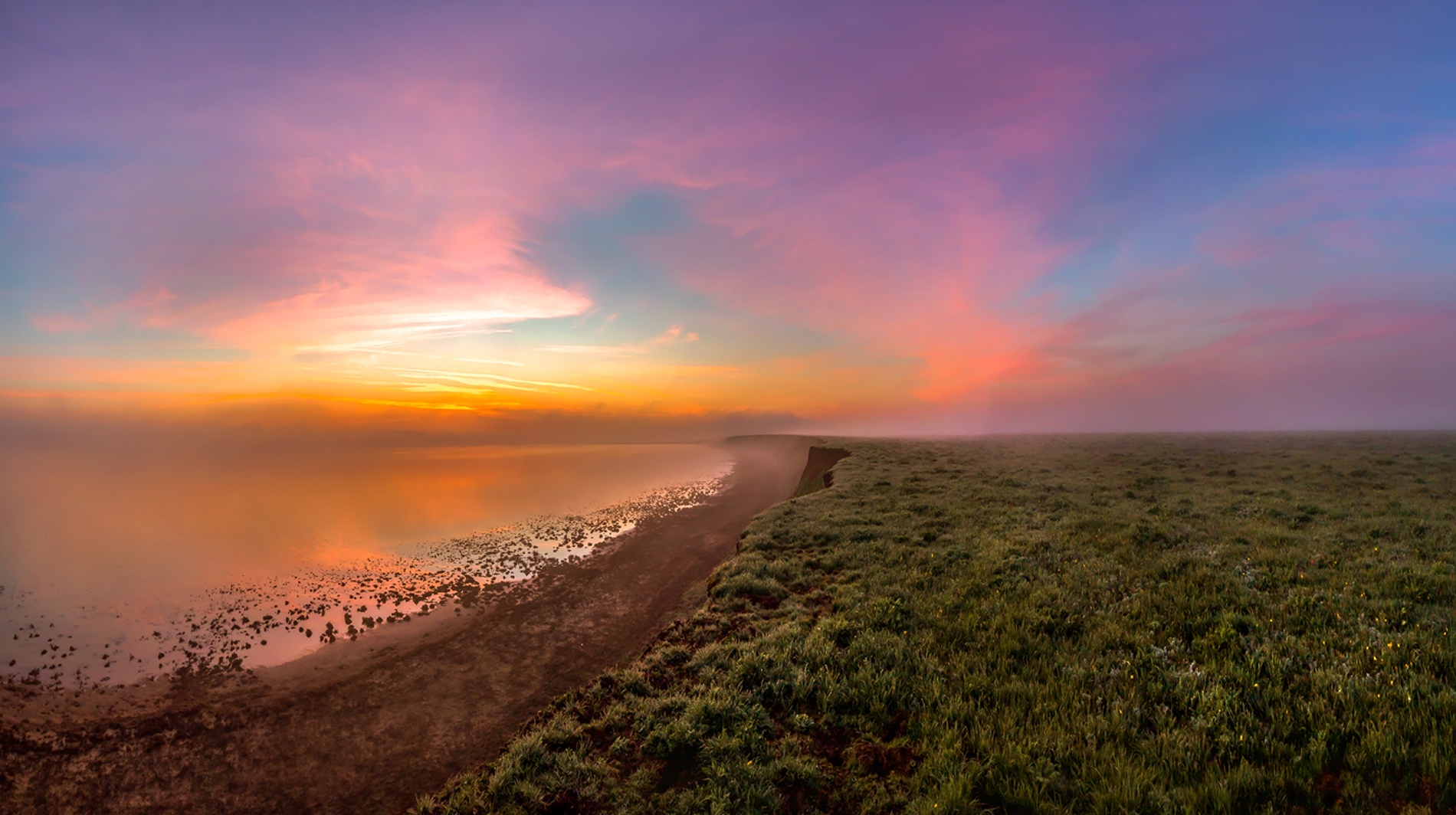 Маныч-Гудило заказник: Государственный природный заказник краевого значения «Маныч-Гудило» расположен в северо-западной части Апанасенковского района на границе с Республикой Калмыкия, на территории муниципального образования села Киевка Апанасенковского района Ставропольского края,Апанасенковский район, Ставропольский край This image is related to the protected area of Russia number 2610023